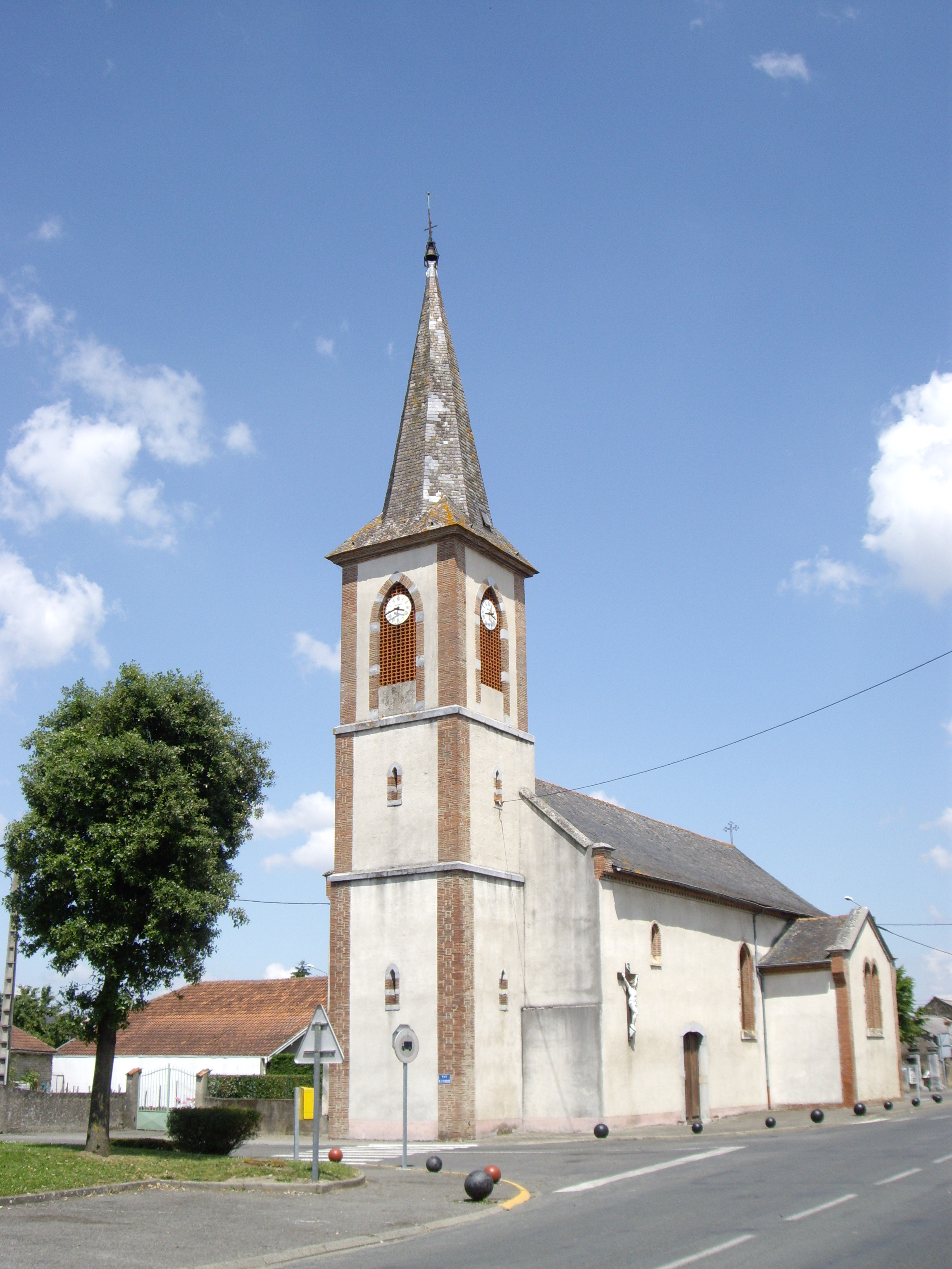 Église de l'Assomption (Bours, Hautes-Pyrénées, France)